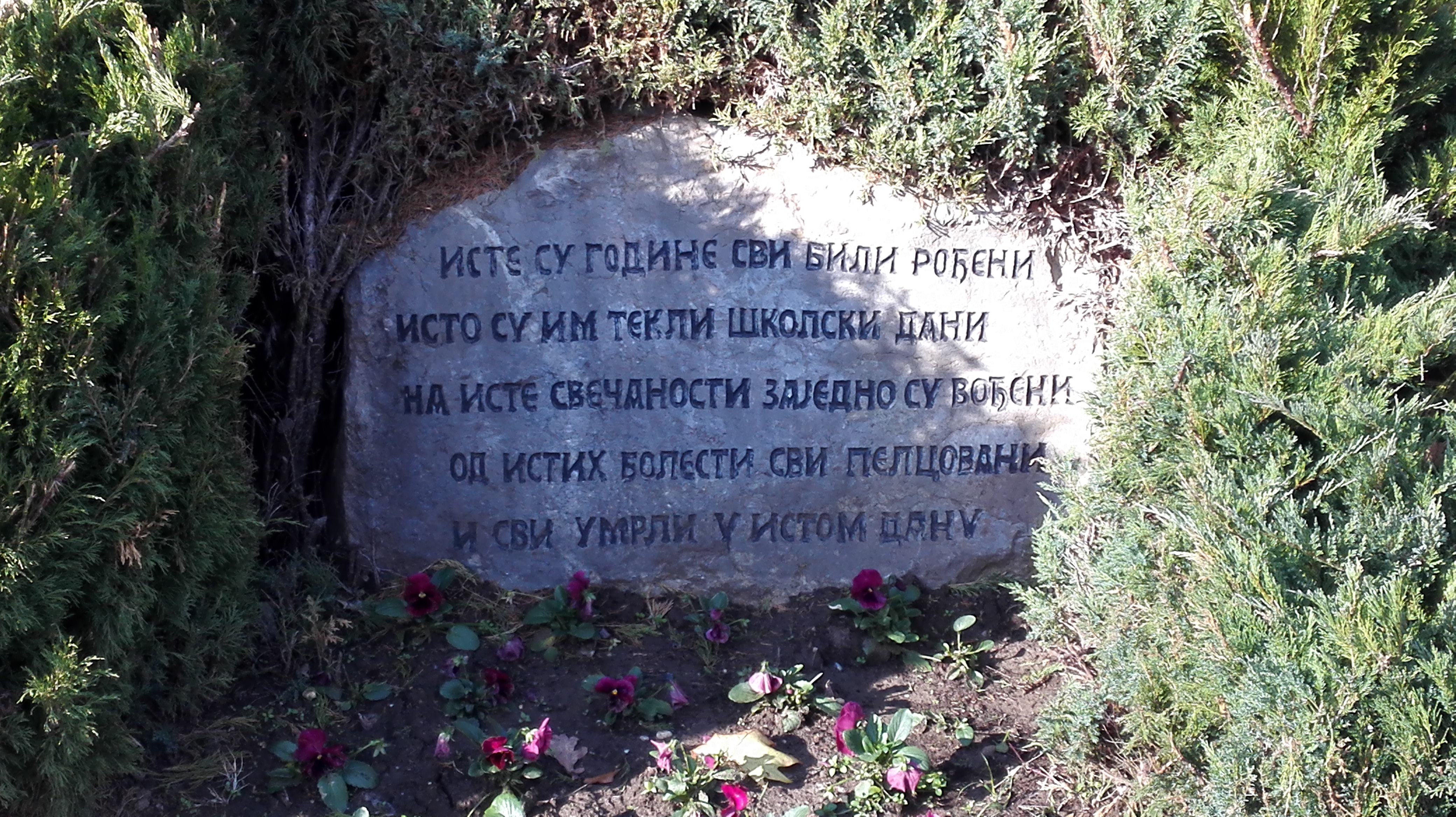 Spomen-park Šumarice u Kragujevcu, stihovi Desanke Maksimović "Krvava bajka"